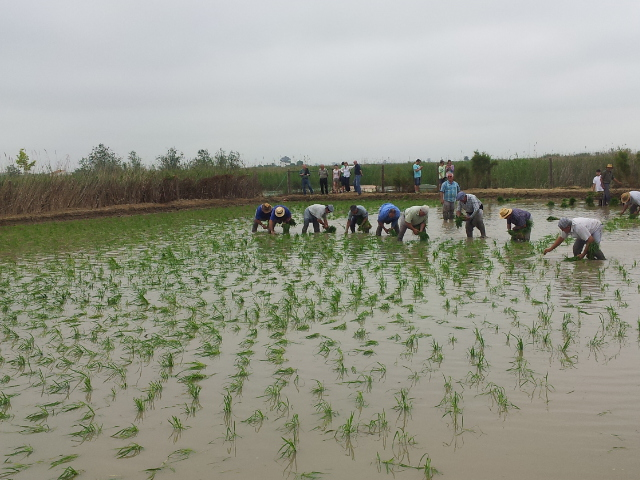 Plantadors d'arròs a la Festa de la Plantada, festa tradicional de l’arròs que s’organitza a Deltebre. Tradicionalment, l’arròs es conreava mitjançant el mètode del trasplantament i el treball de l’home i els animals.